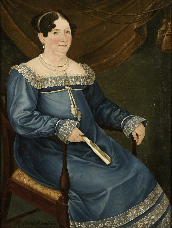 Madre del Libertador de Chile, don Bernardo O'Higgins Riquelme